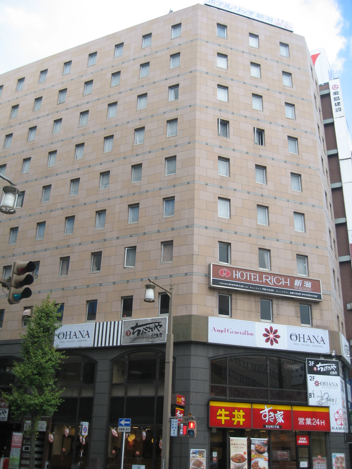 ホテルリッチ新潟の画像。